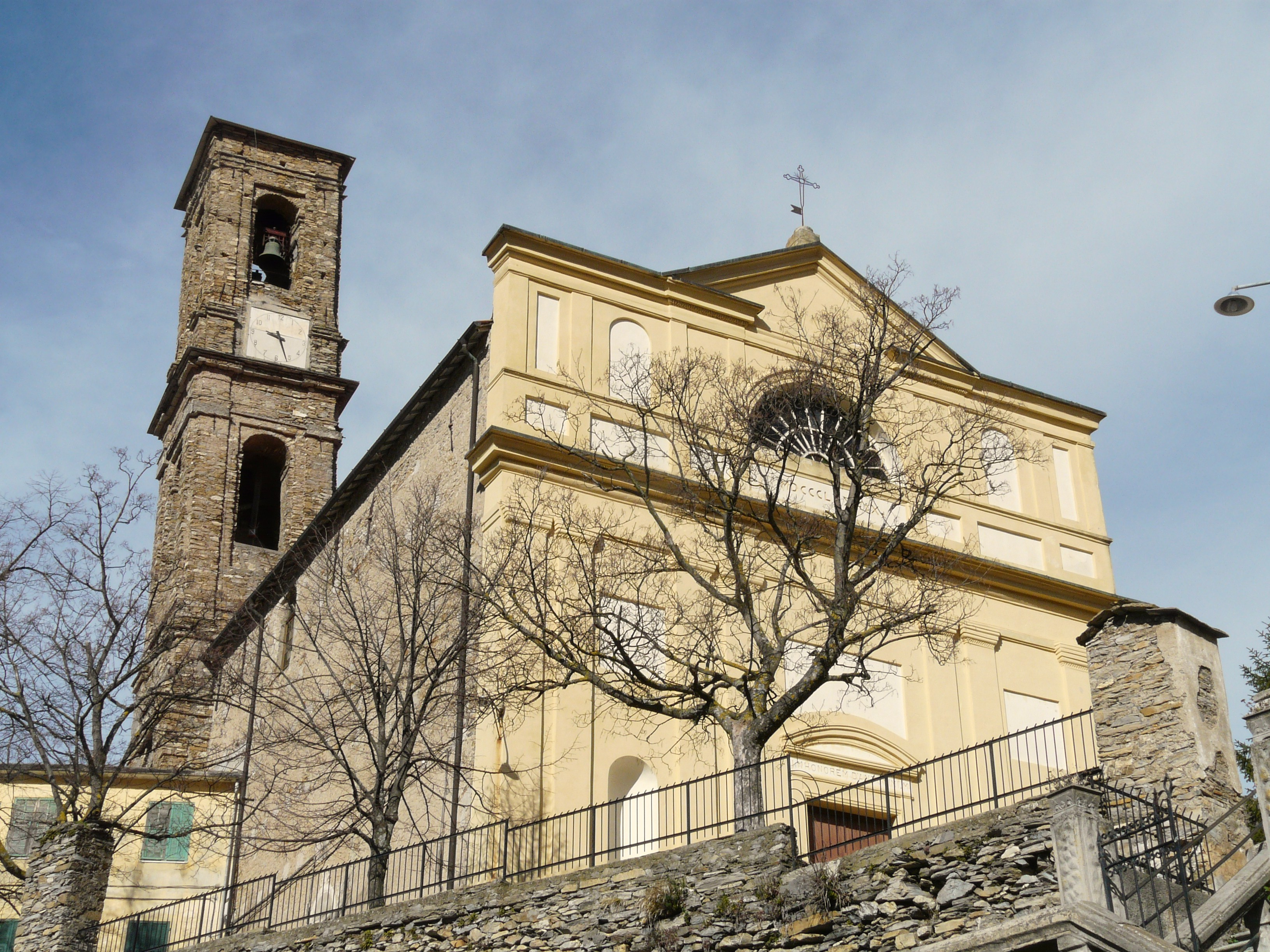 Chiesa di Sant'Antonino, Carpasio, Liguria, Italia